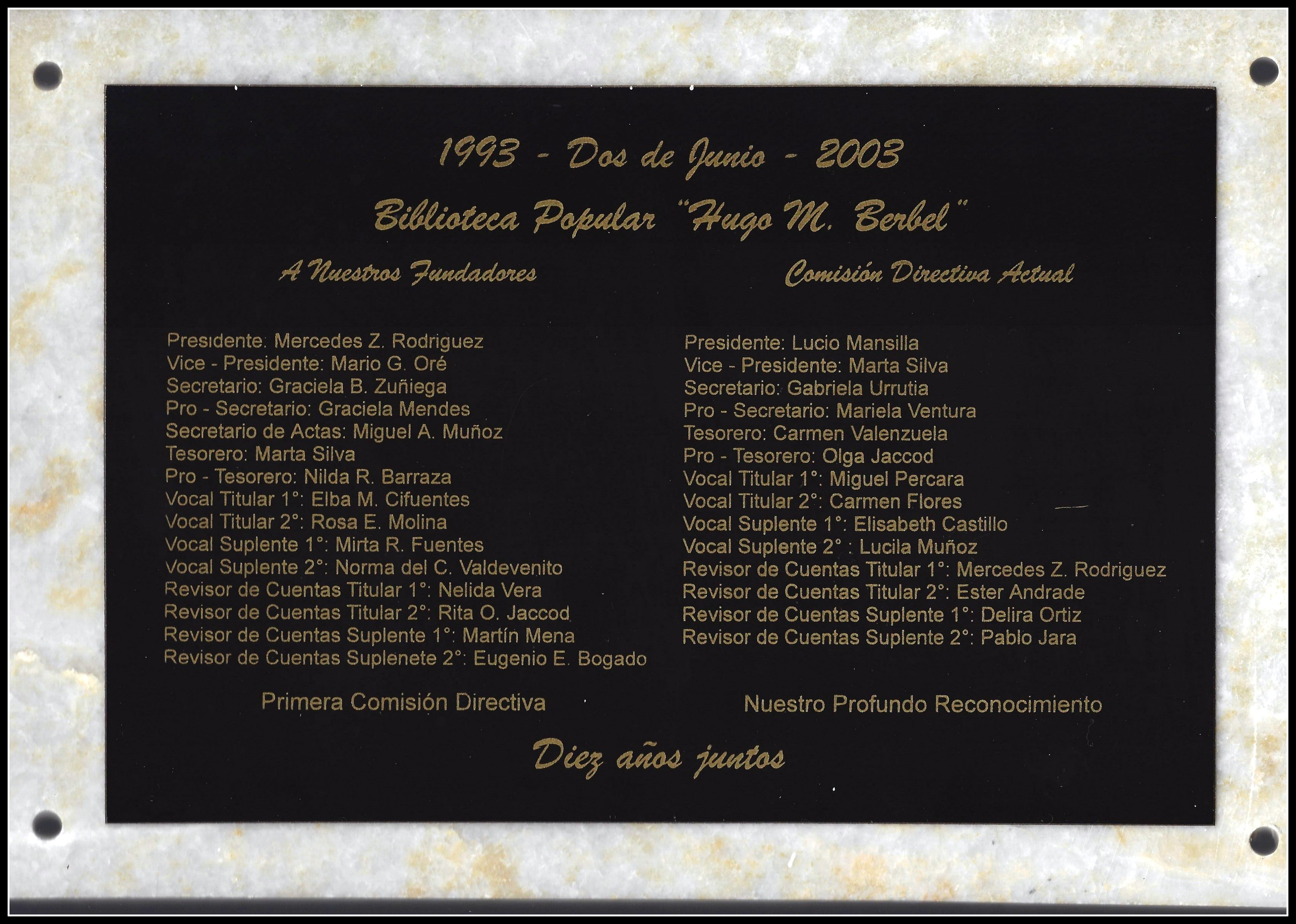 Placa conmemorativa 10º aniversario